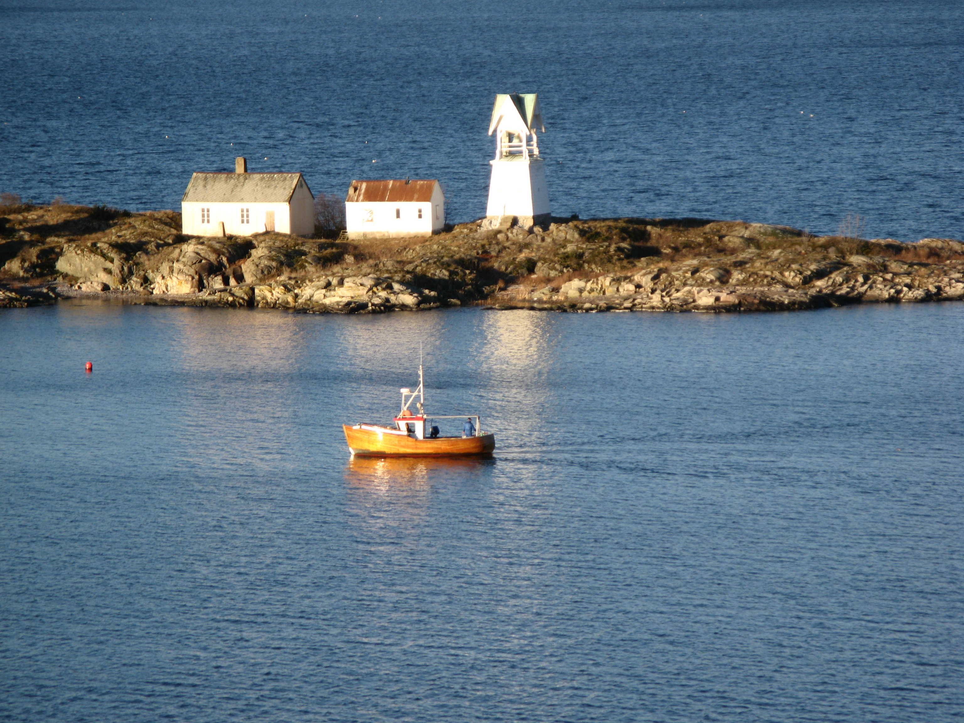 no: Søndre Langåra tåkeklokke Island in the Oslo Fjord